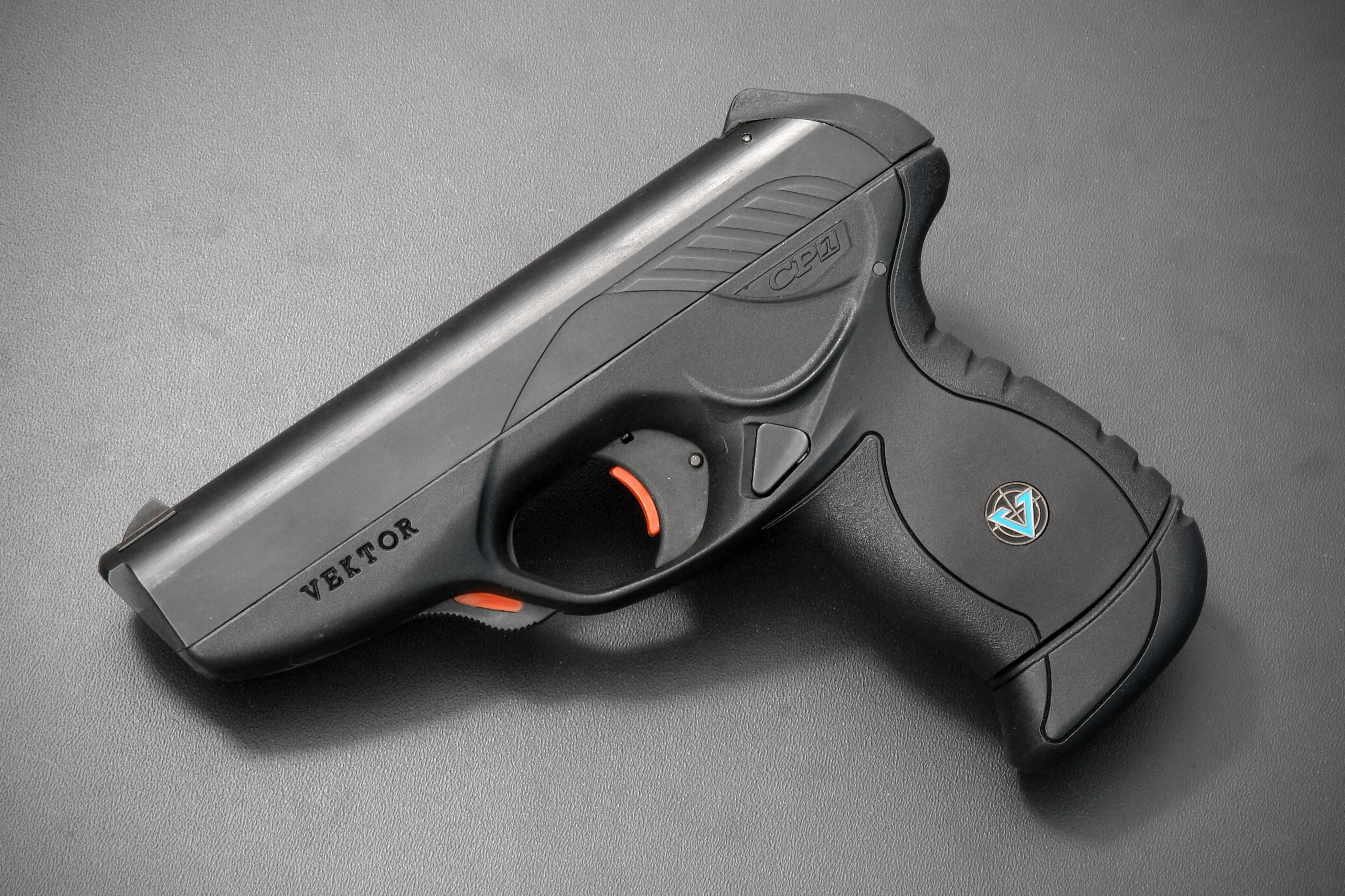 Vektor CP1 semi-automatic pistol